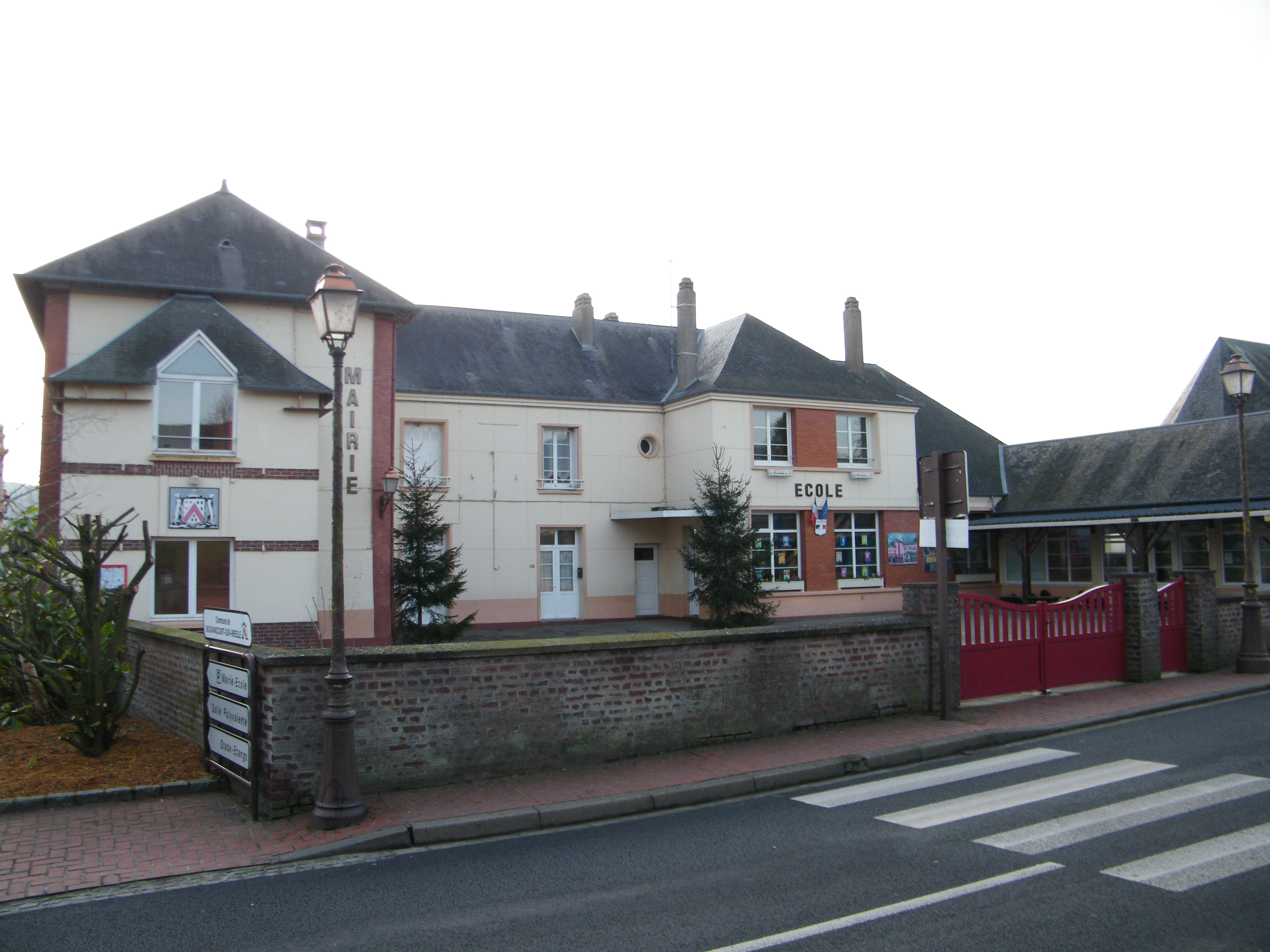 Mairie-école.